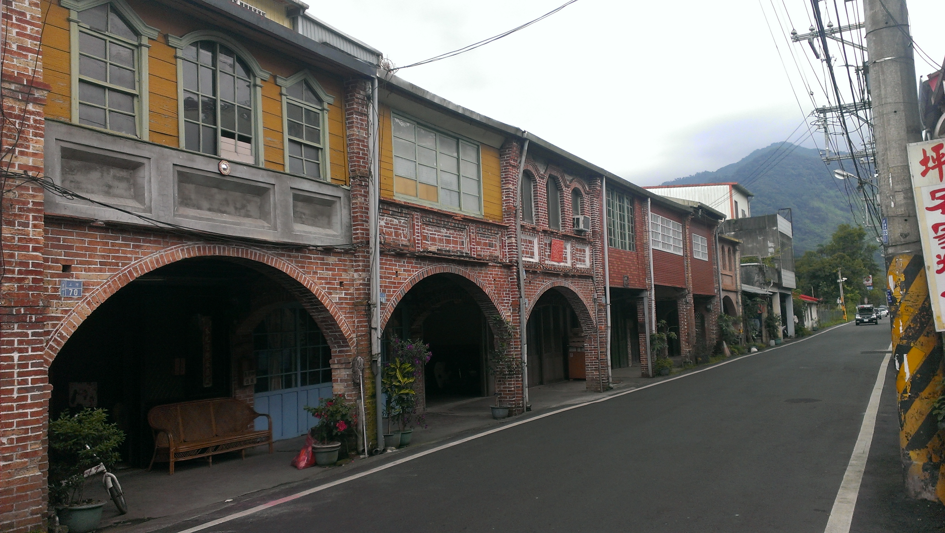 中文（台灣）: 位於臺灣新竹縣竹東鎮之上坪老街。